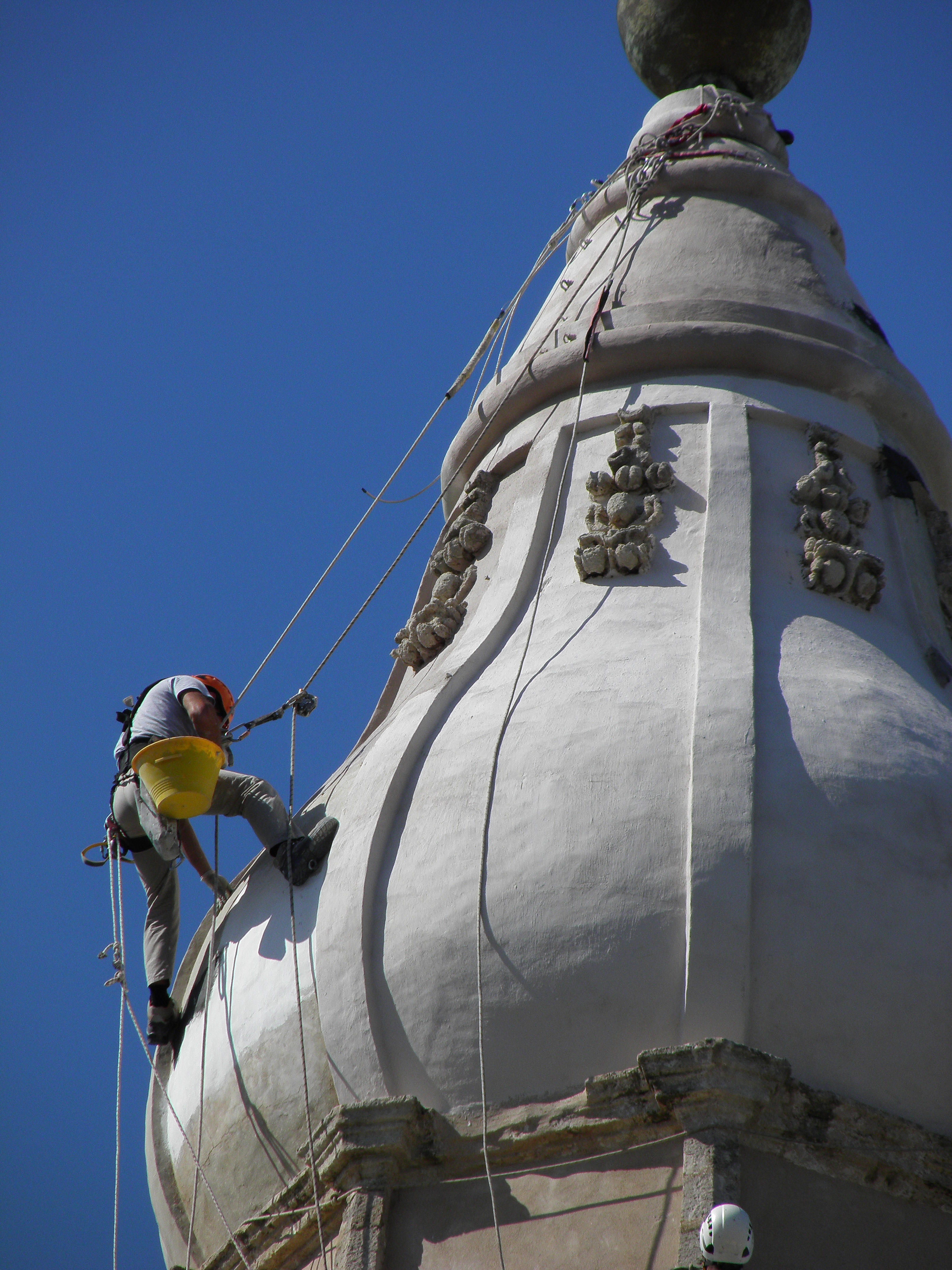 Restauratori-scalatori che lavorano a 65 mt. di altezza sul campanile della cattedrale di Monopoli (BA) danneggiato da un fulmine.